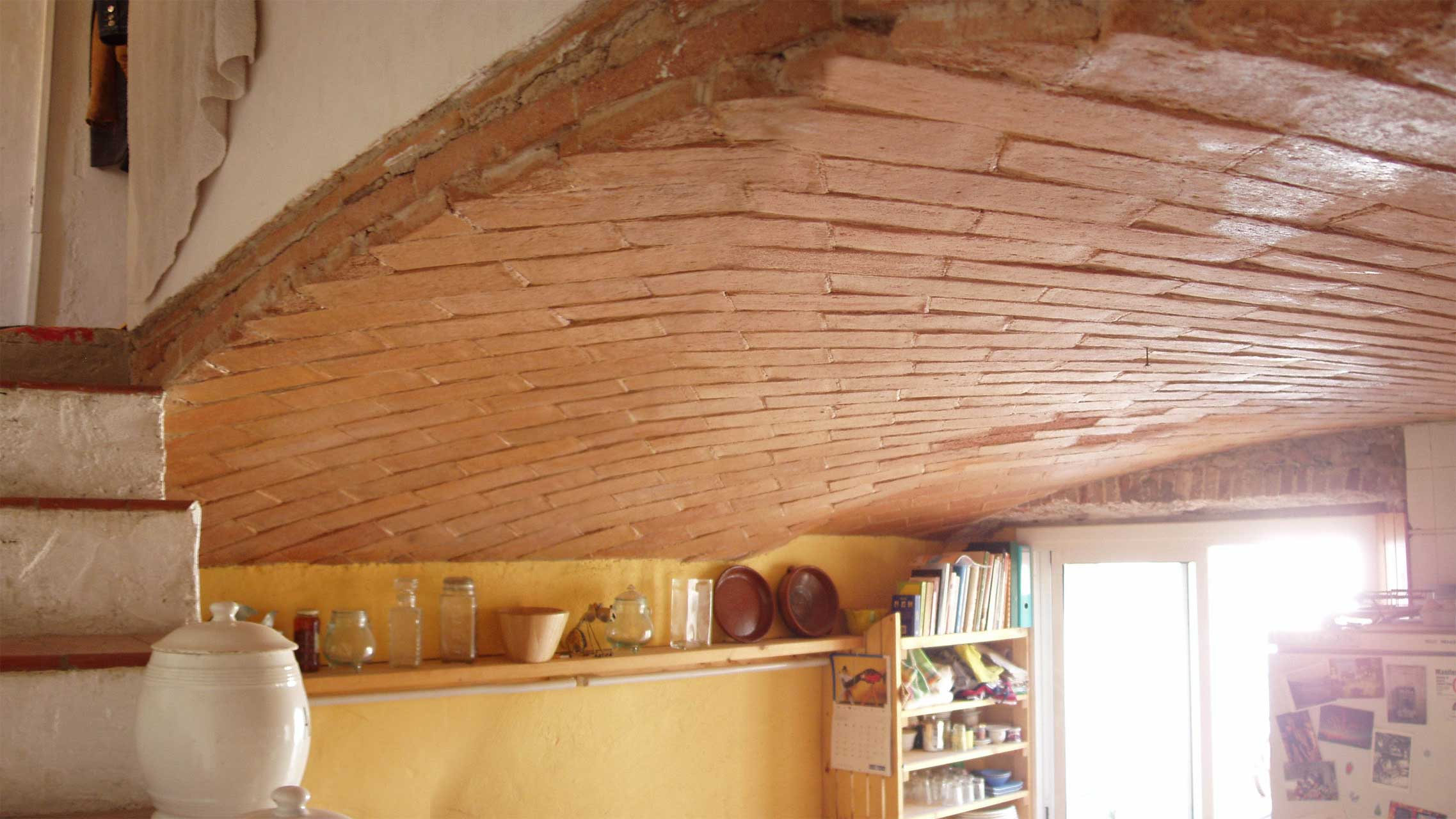 Bóveda catalana. Tipo de bóveda tabicada, tradicional en Cataluña, en una casa en Barcelona (composición panoràmica de 2 fotografias).